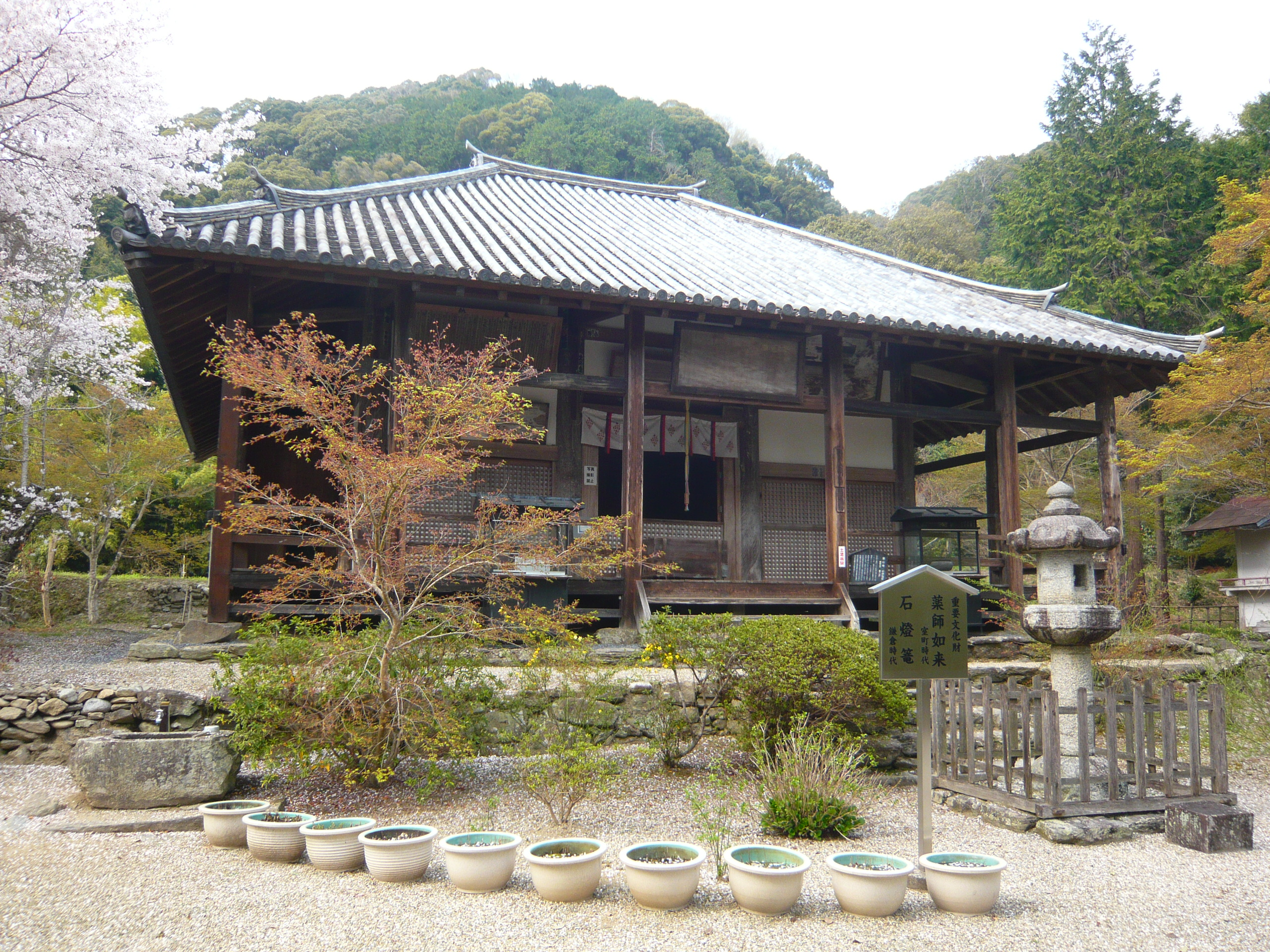 榮山寺薬師堂(本堂) Yakushidō, Eisanji 2011.4.11